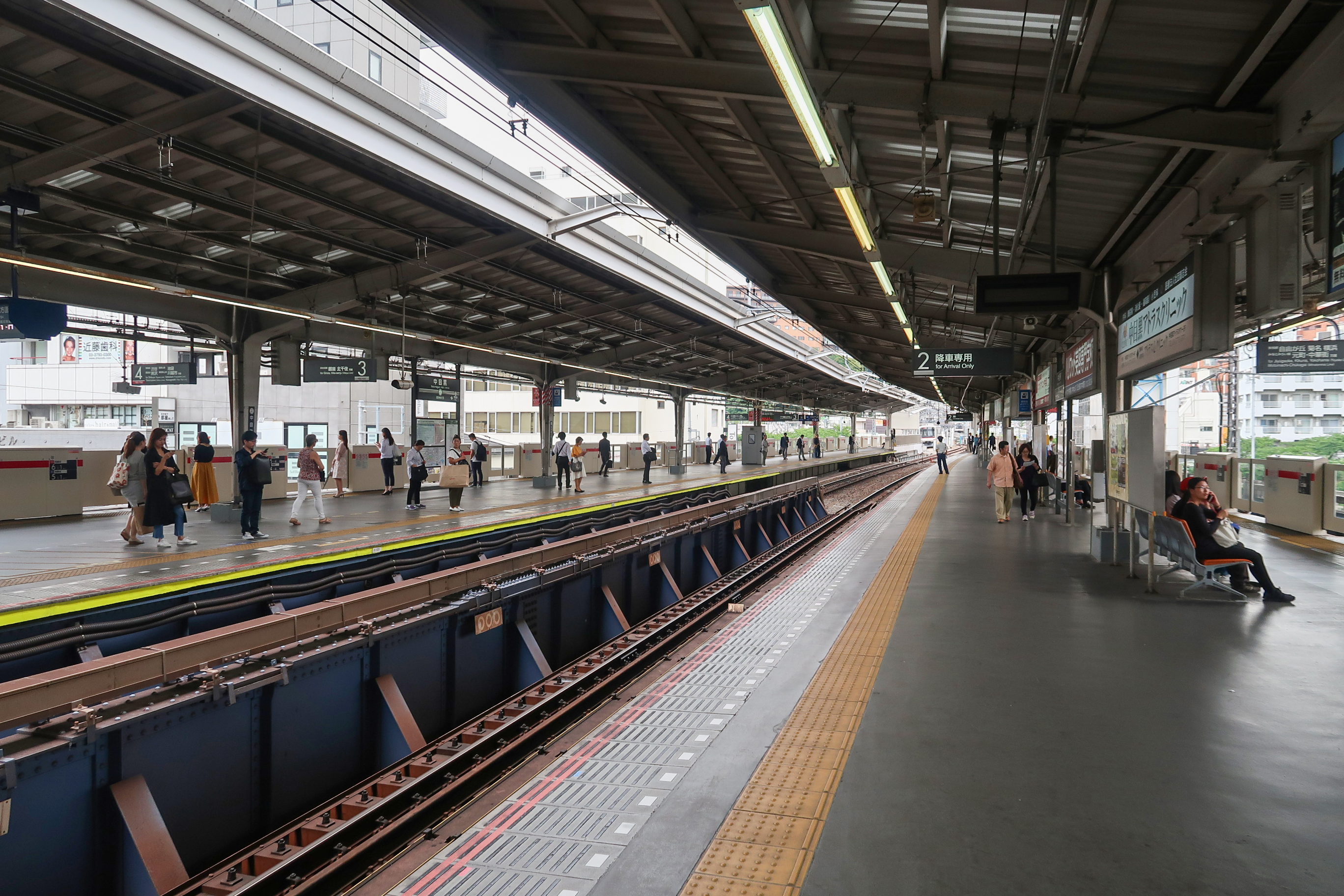 Naka-Meguro Station